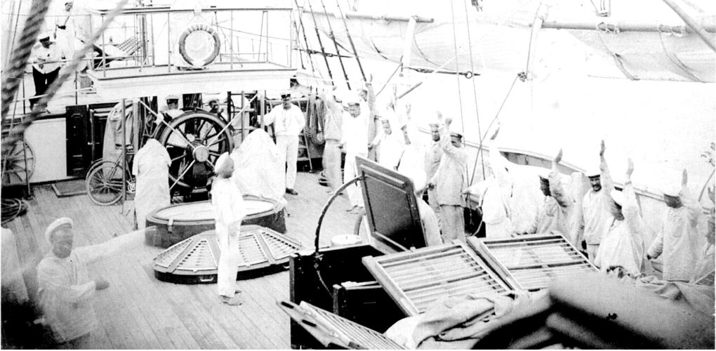 Утряняя зарядка на крейскре Забияка, Порт-Артур, 1902 год